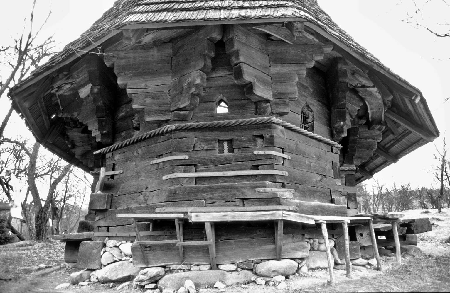 Partea de răsărit a butei bisericii, în jurul altarului. Foto: Alexandru Baboş, primăvara 1995.